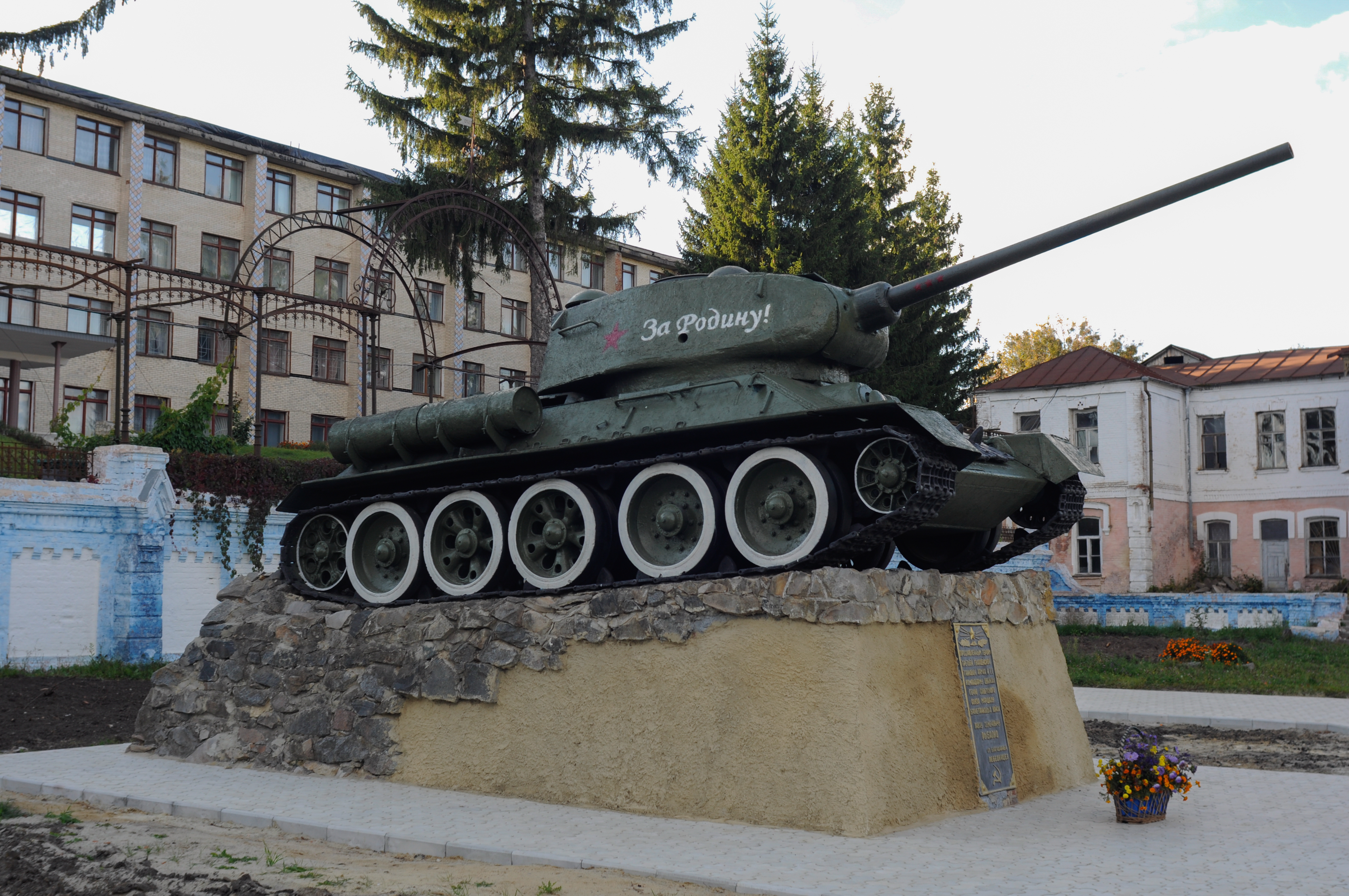 Танк Т-34, встановлений на честь 3-ї гвардійської армії, Лебединський район, с. Малий Вистороп, центр сільради, подвір’я технікуму